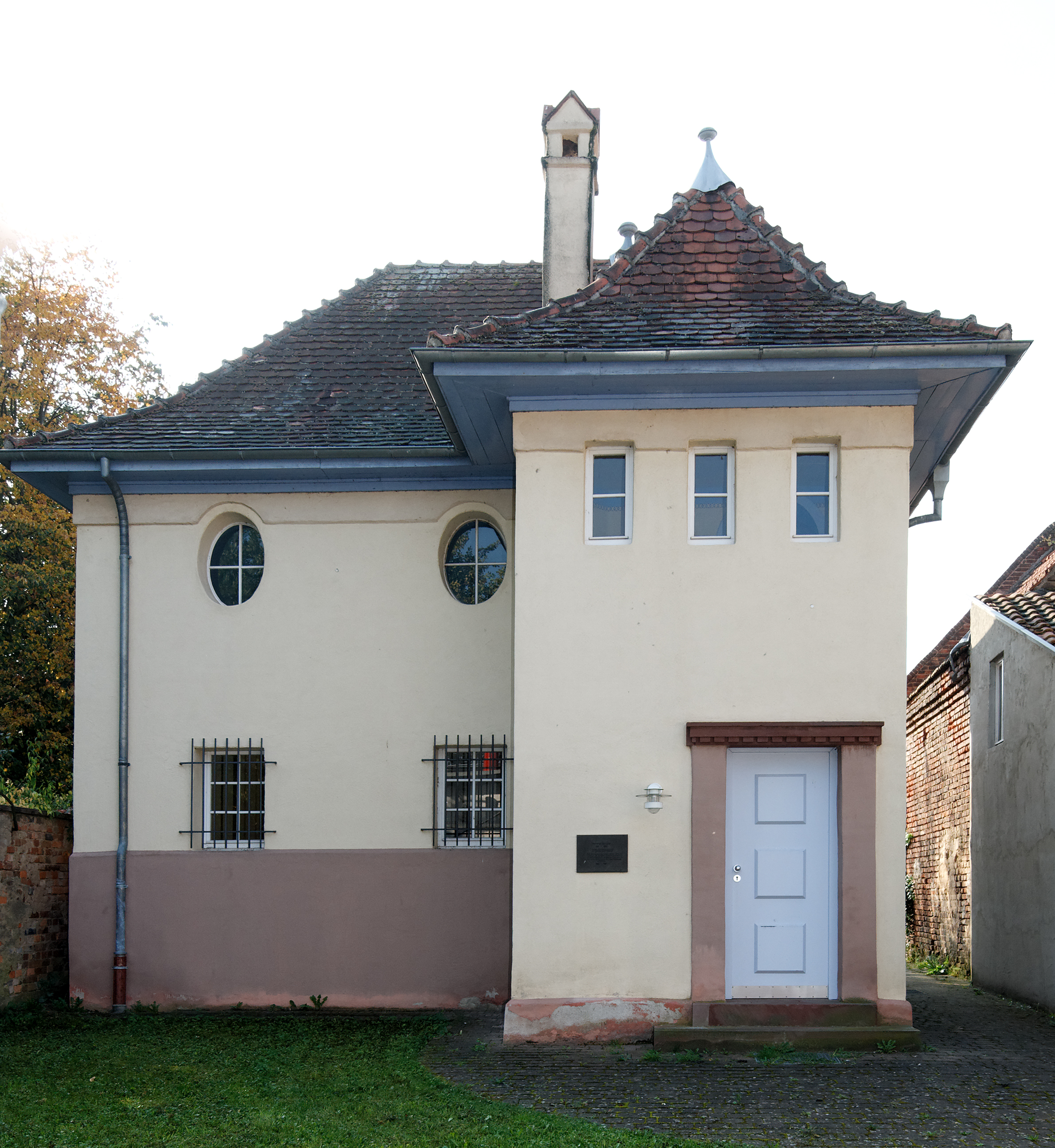 Ehemalige Synagoge in Hainburg (Hessen), Ortsteil Klein-Krotzenburg. Die Synagoge wurde 1913 anstelle eines Betsaals erbaut. Durch den seitlichen Vorbau des Eingangs hat der Grundriss die Form eines Winkels.